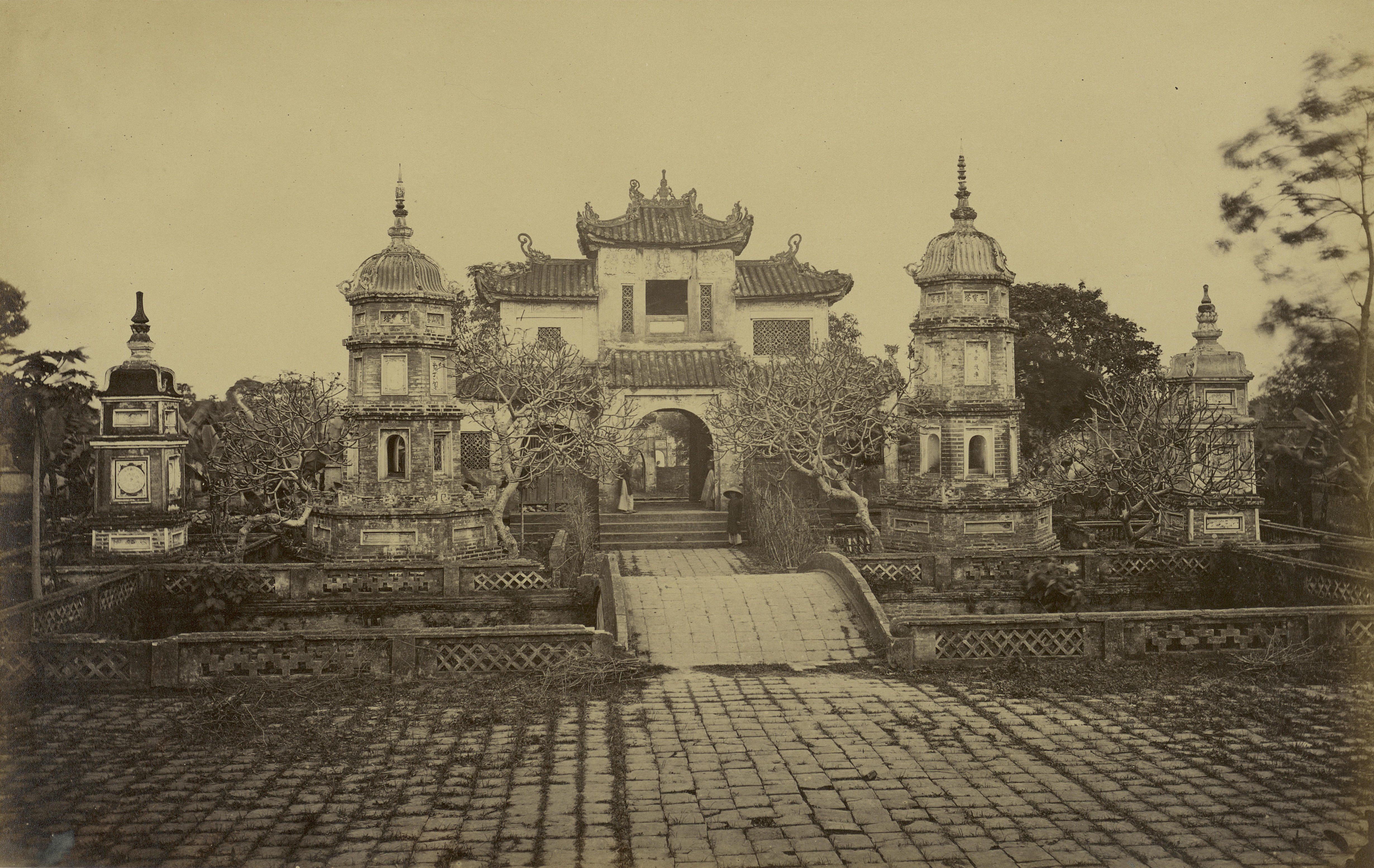 La Pagode des Supplices (ainsi appelée par les Français en raison des bas-reliefs la décorant et figurant les enfers), également connue sous le nom de pagode de Nguyen Dang Giai (du nom de son commanditaire), faisait partie des ensembles architecturaux les plus importants de Hanoi. Ce sanctuaire bouddhique avait été édifié en 1842 ou 1846 par le gouverneur de la ville. Son nom classique est Lien Tri Tu (temple de l'Étang aux Lotus) ; ce dernier rappelait que le bâtiment principal était entouré de bassins où proliféraient les lotus. Le sanctuaire était constitué d'un grand nombre de bâtiments (en brique et en bois) qui allaient être rasés en 1889, lors des premiers travaux d'urbanisme qui visaient à faire de Hanoi la capitale de l'Indochine française. Il ne reste rien de cette vaste cour photographiée ici, dont on aperçoit le portail donnant sur la salle principale et quatre stupa reliquaires. L'édifice de la poste, toujours visible aujourd'hui, occupe l'emplacement du sanctuaire.